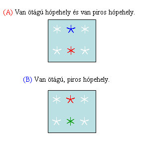 Kvantor (logika)